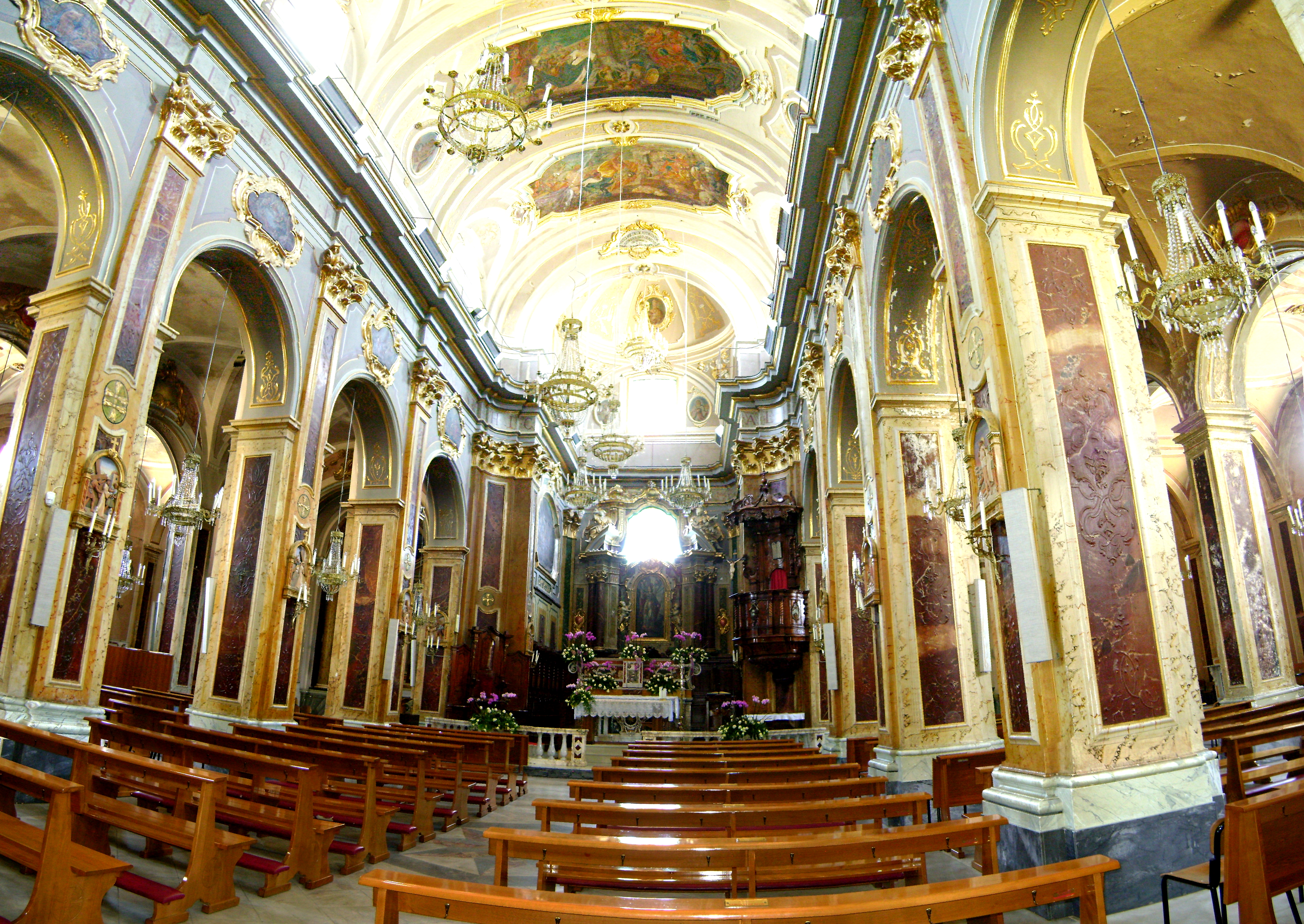 Interno del duomo di San Leucio. Atessa, Chieti.